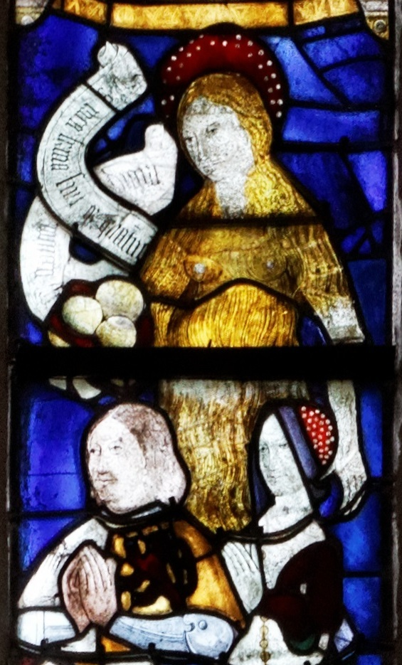 Die hl. Maria von Ägypten, gemäß der Legende nur mit ihrem Haupthaar bedeckt, als Fürbitterin für ein Stifterpaar; Detail eines Bildfensters in der Kathedrale von Quimper